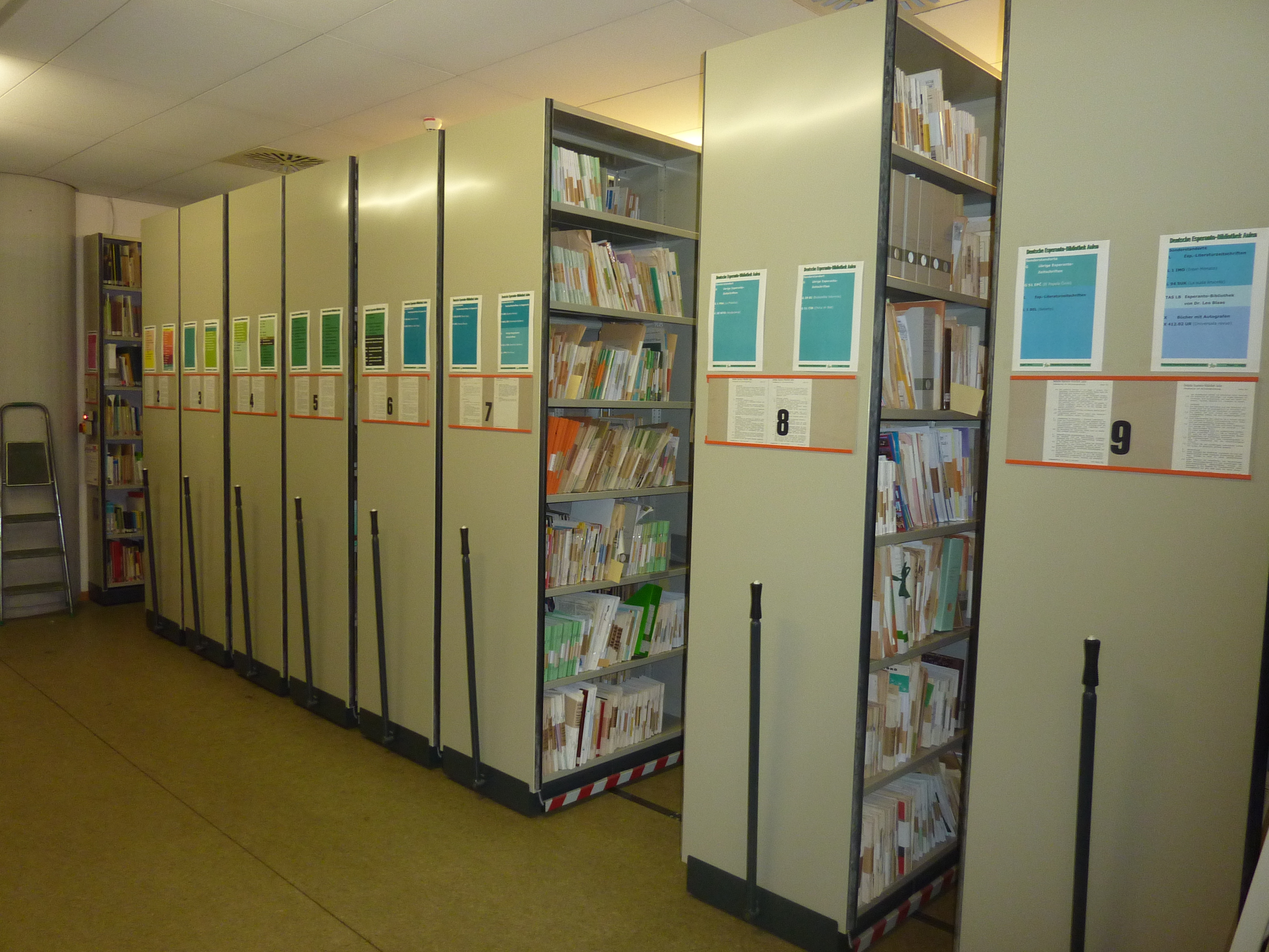 Bretaroj en la Germana Esperanto-Biblioteko en Aalen.